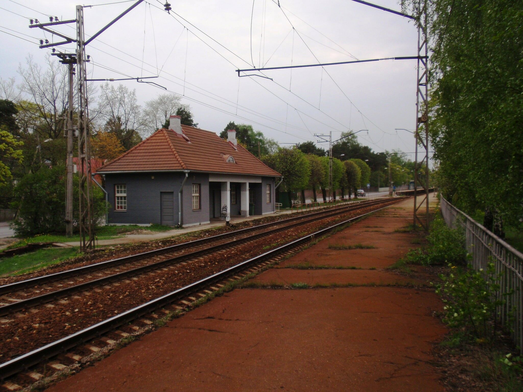 Rahumäe rongipeatus Tallinnas.